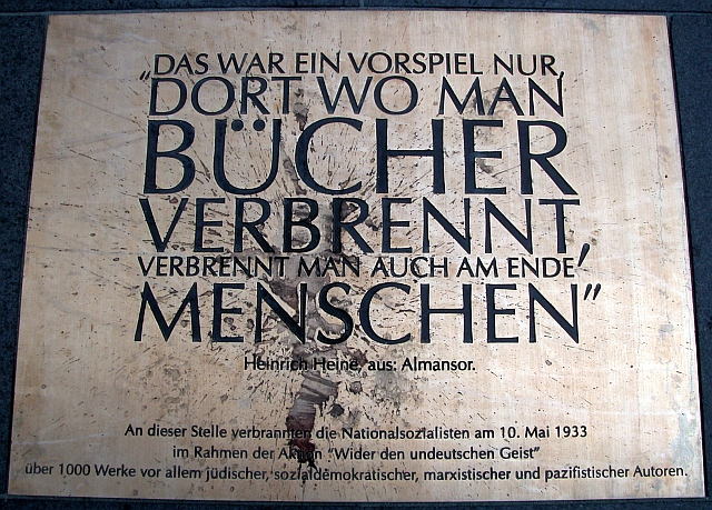 Braunschweig: Gedenktafel zur Bücherverbrennung am 10. Mai 1933 in Braunschweig.